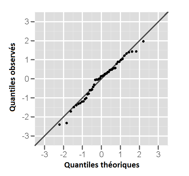 Un tracé de probabilité normale